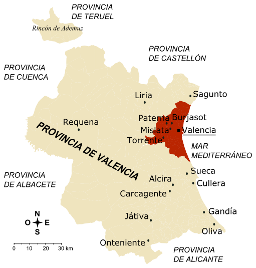 Mapa de la provincia de Valencia (España) En marrón oscuro están marcados el casco urbano y los municipios de la primera corona del área metropolitana de Valencia; en su conjunto, concentran al 60,62% de la población provincial en el 5,73% de su superficie, con una densidad media de 2.407 hab/km2. Las ciudades indicadas en el mapa son aquellas de más de 30.000 habitantes (si pertenecen al área metropolitana de Valencia) o de más de 20.000 habitantes (para el resto de localidades), según el censo INE 2005. Autor: Rodriguillo Realizado a partir de: Image:Valencia - Mapa municipal.svg Otras versiones: english, français